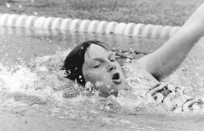 Cornelia Polit ADN-ZB Linl-30.7.78-str- Florenz: Jugend-Europameisterschaften im Schwimmen und Wasserspringen- Mit ihrem Sieg über 100 m Rücken am 30.7. in 1:04,16 min gewann Cornelia Polit (DDR) bereits ihre zweite Goldmedaille, nachdem sie bereits am 28.7. auf der kurzen Rückenstrecke gewinnen konnte. Foto von früherem Wettkampf.